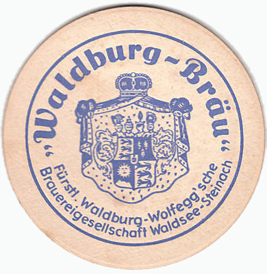 Bierdeckel "Waldburg-Bräu. Brauereigesellschaft Waldsee-Steinach"